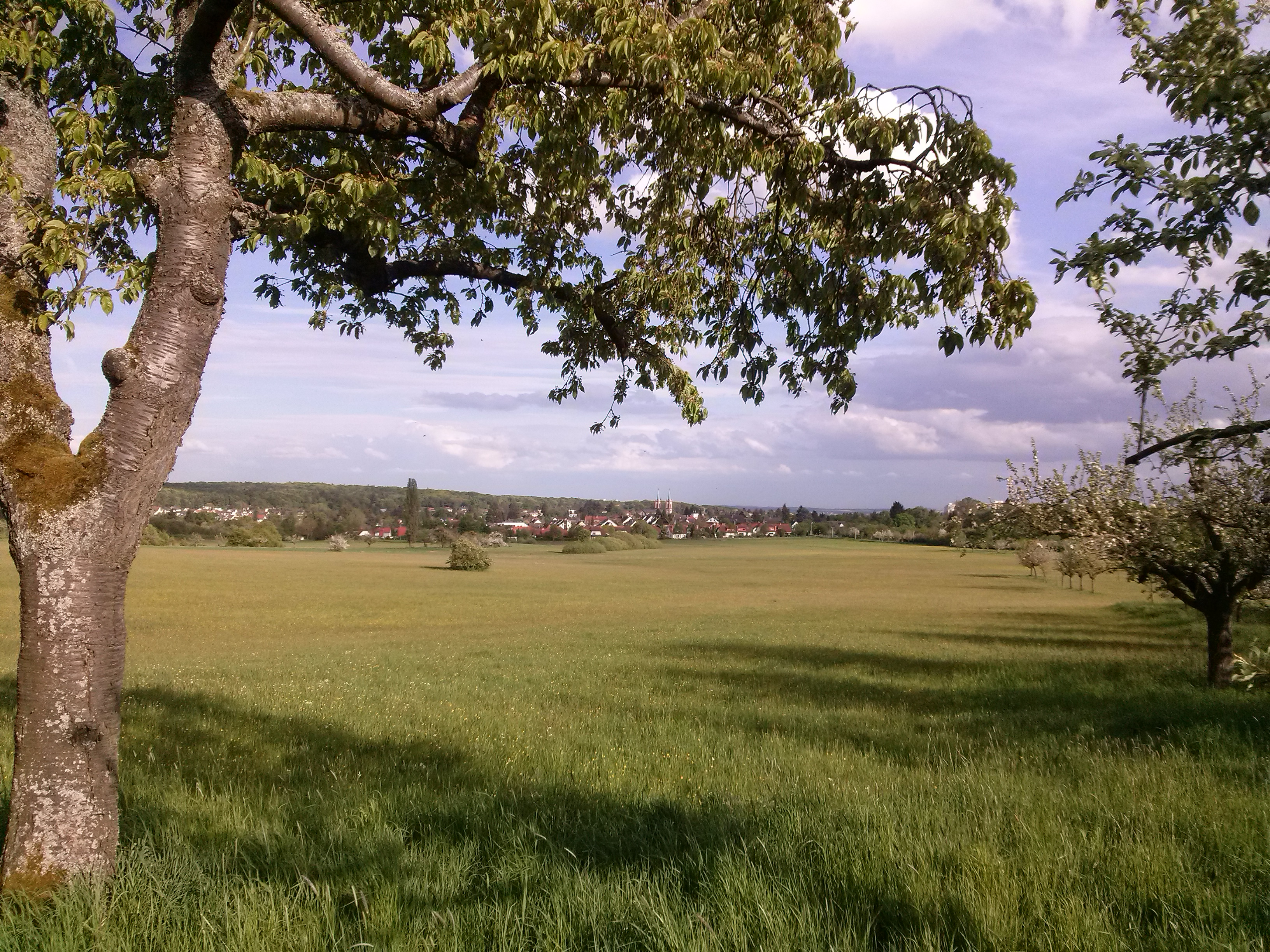 Das Kirdprfer Feld ist geschmückt mir Bäumen und Blumen. Auf diesem Bild sind die Türme der Katholischen Kirche in Kirdorf gut zu erkennen.